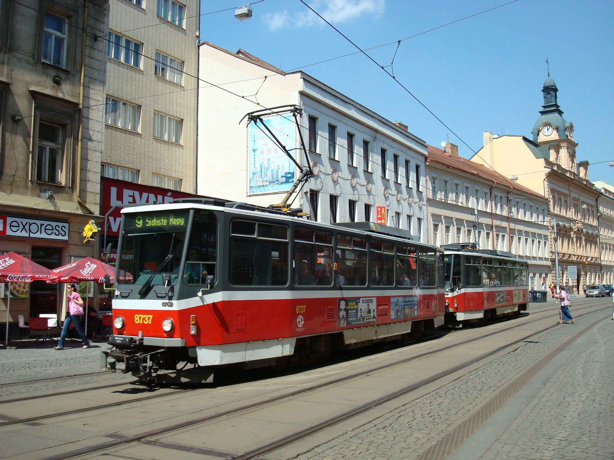 Souprava tramvají Tatra T6A5 v Praze